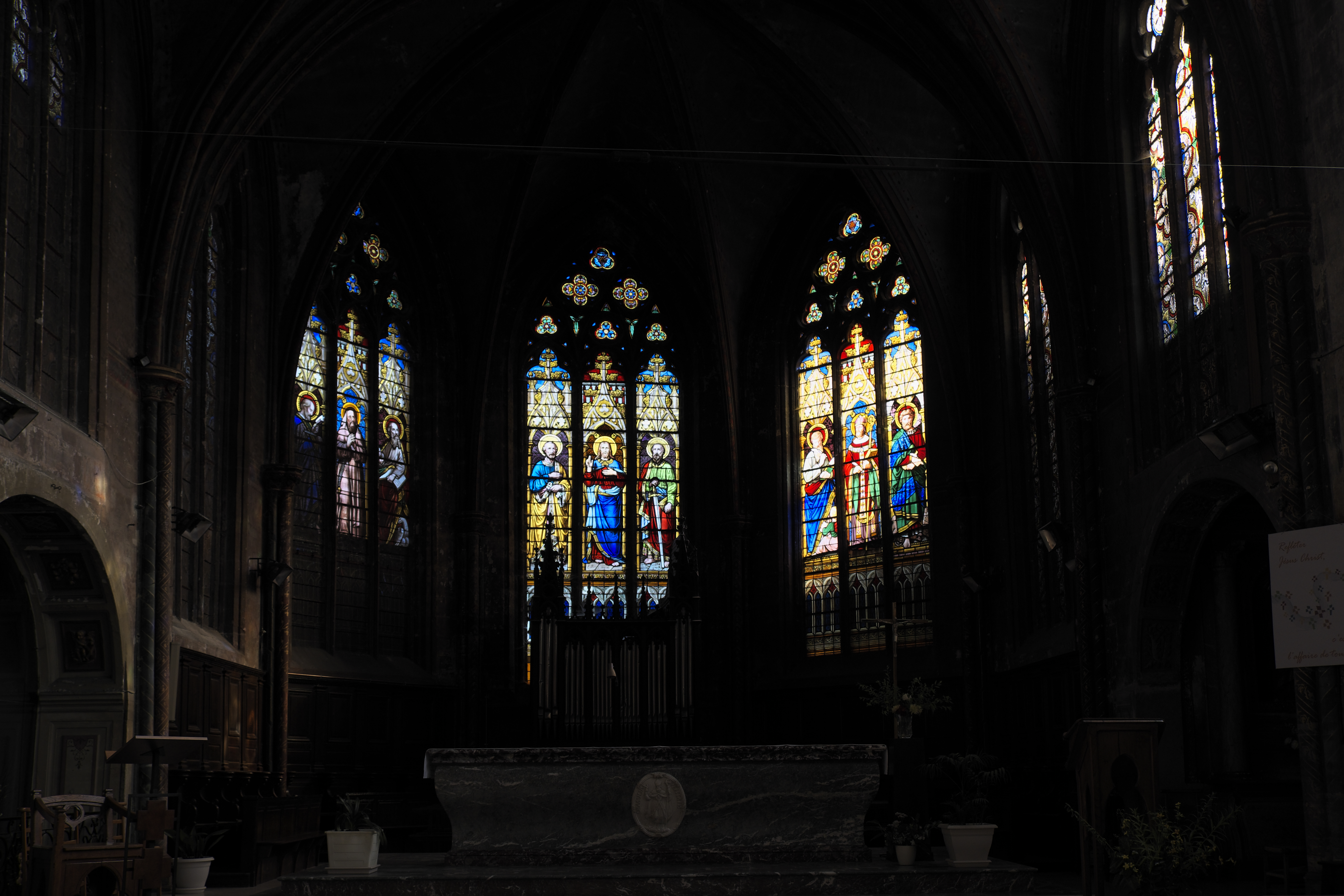 Katholische Saint-Antoine, ehemalige Klosterkirche der Augustinereremiten, in Bar-le-Duc im Département Meuse (Lothringen/Frankreich), Chorfenster